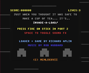 Invade-a-load: invito a gicare al clone di "Space Invaders", mentre si attende il caricamento di un gioco sul Commodore 64